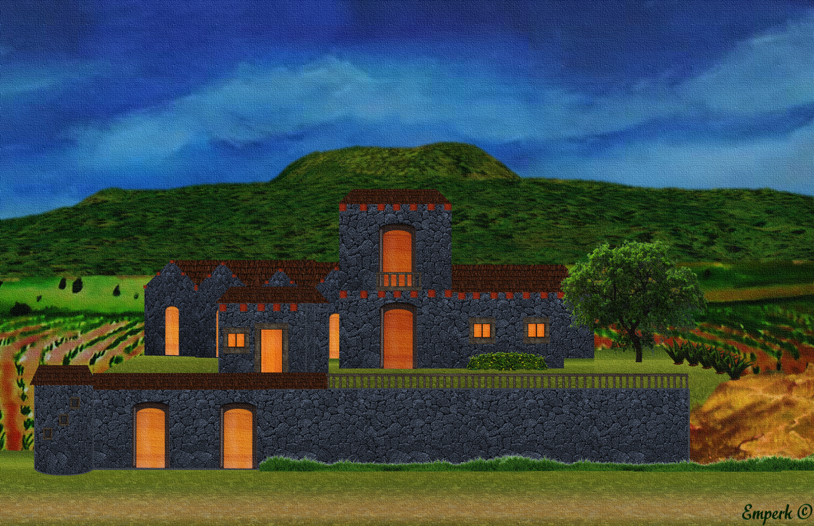 Ilustración de lo que fue la Hacienda de Don José de las Fuentes Parres y que dio origen la Pueblo de Parres el Guarda Tlalpan CDMX. en el año 1880